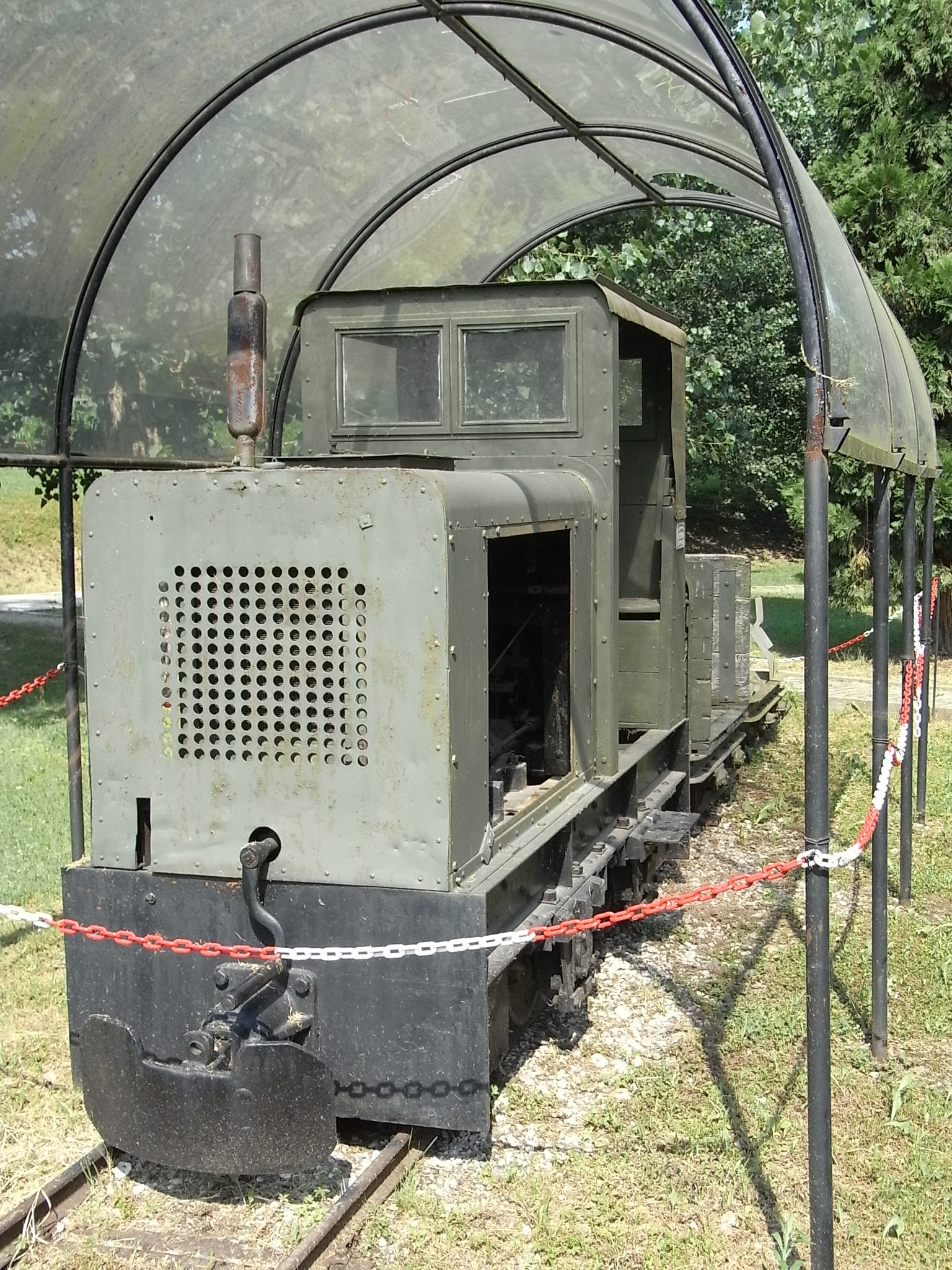 Firmenschild